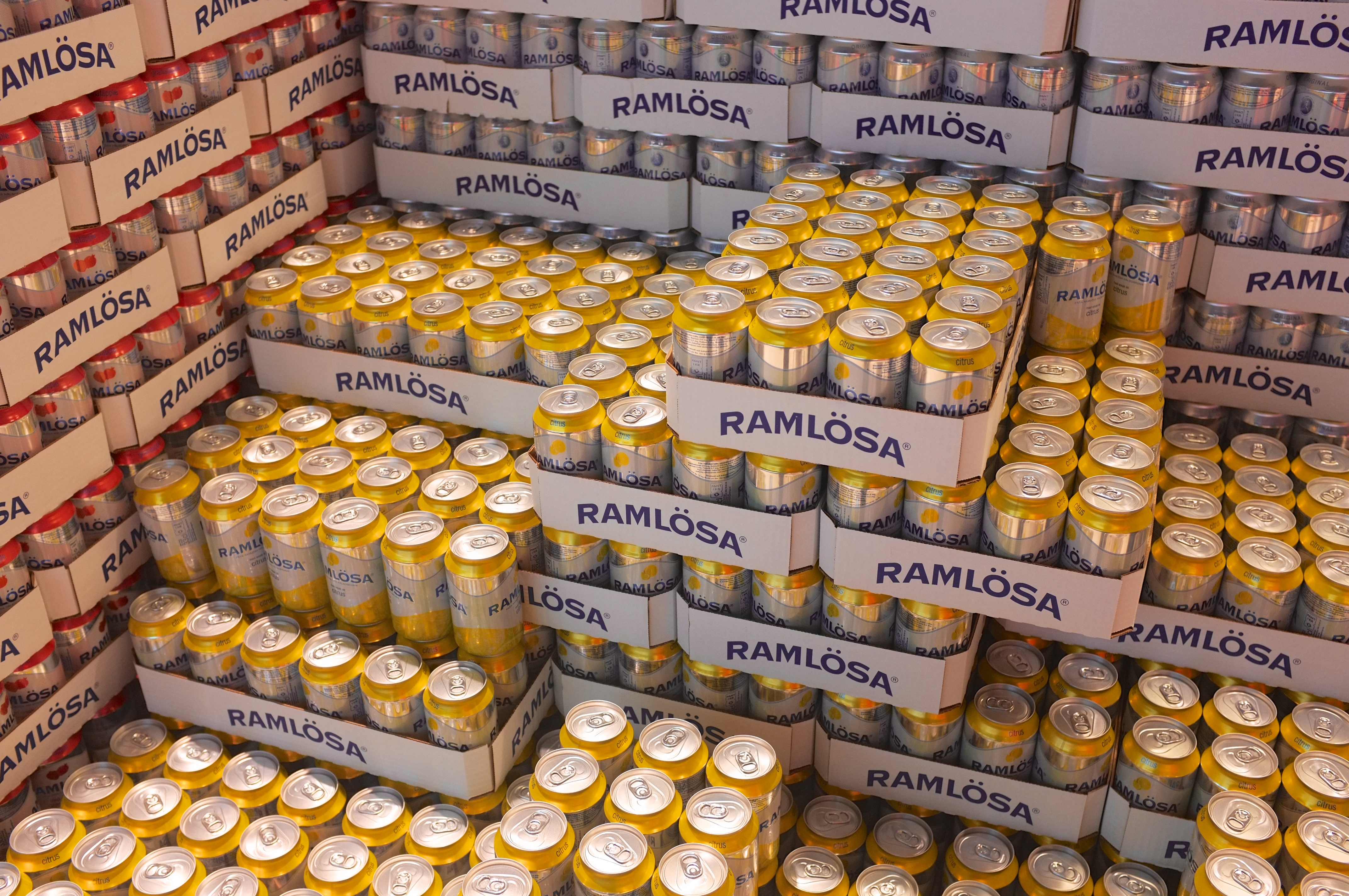 Ramlösa. Nordby Shoppingcenter i Sverige.